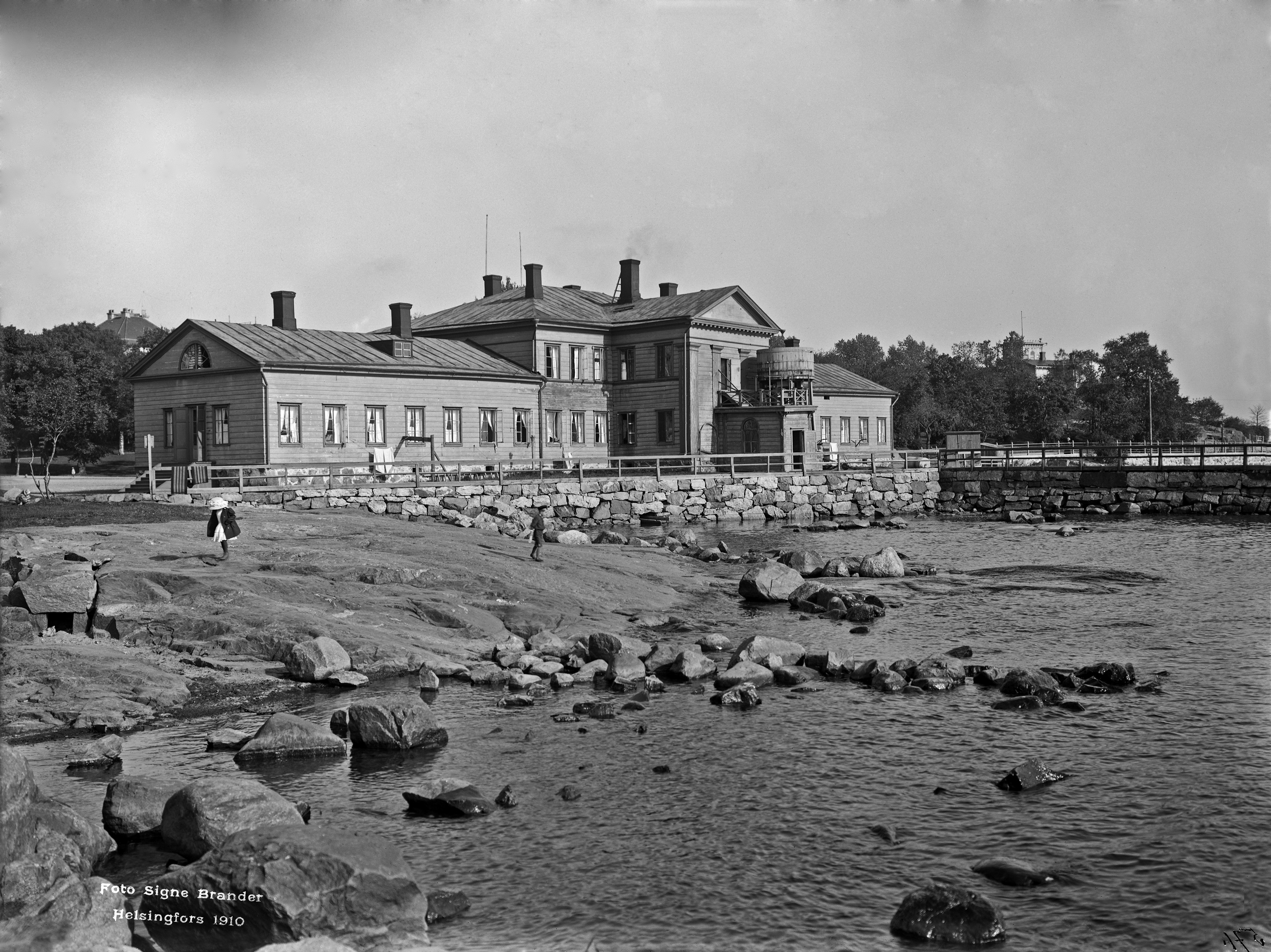 Kaivopuisto. Ullanlinnan kylpylaitos. -- negatiivi ja vedos, lasi paperi pahvi, mv